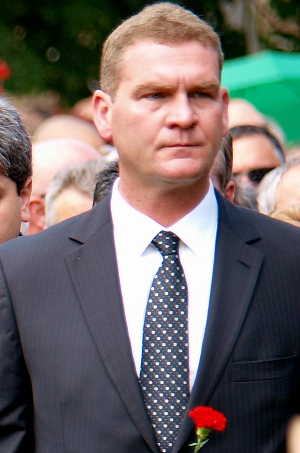 Botka László Horn Gyula temetésén.